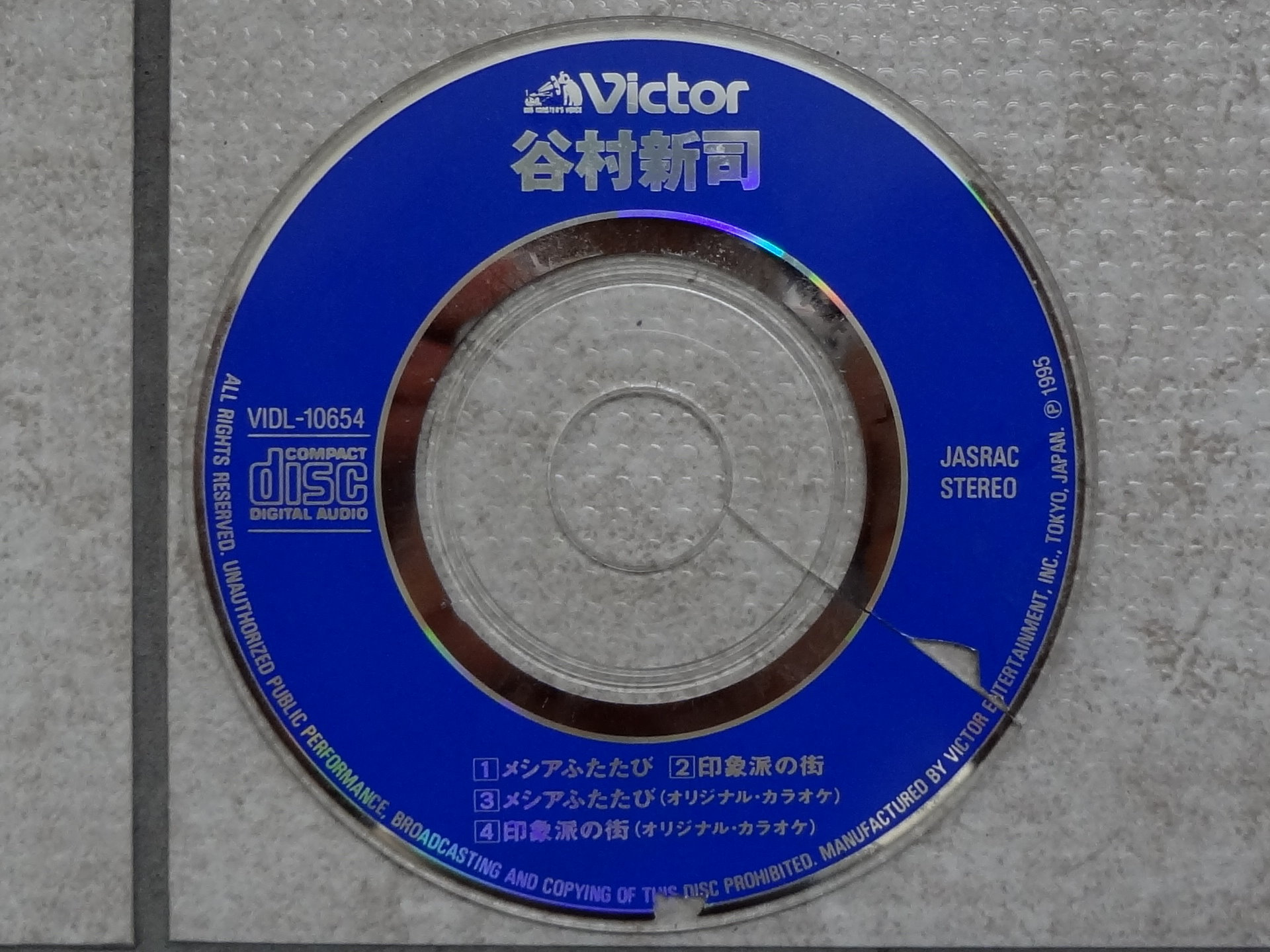 1995年勝利娛樂發行的谷村新司單曲CD《メシアふたたび》，編號VIDL-10654。